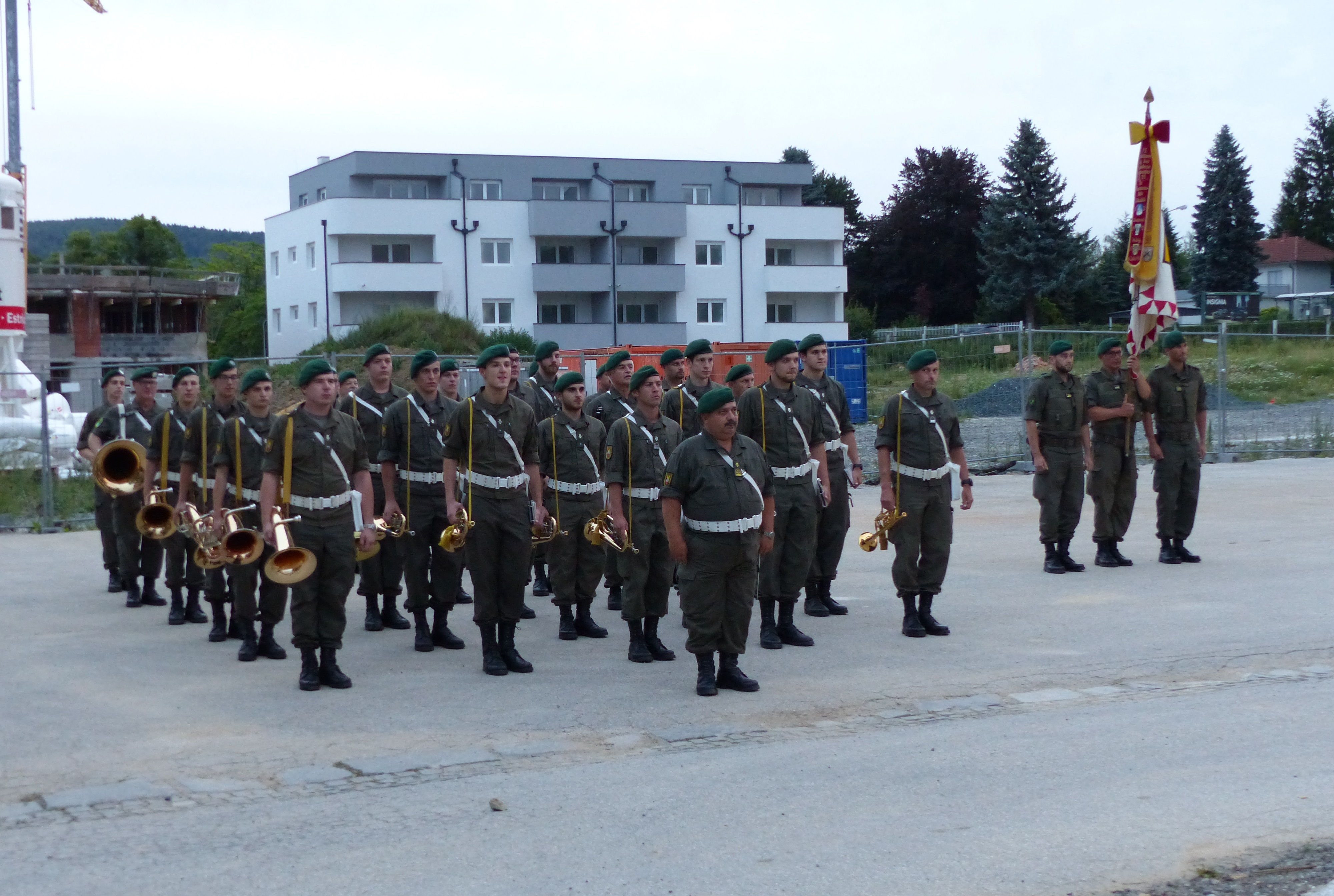 Militärmusik Burgenland in Pinkafeld anlässlich der Aufführung eines Großen Zapfenstreiches auf dem Gelände der ehemaligen Turba-Kaserne.